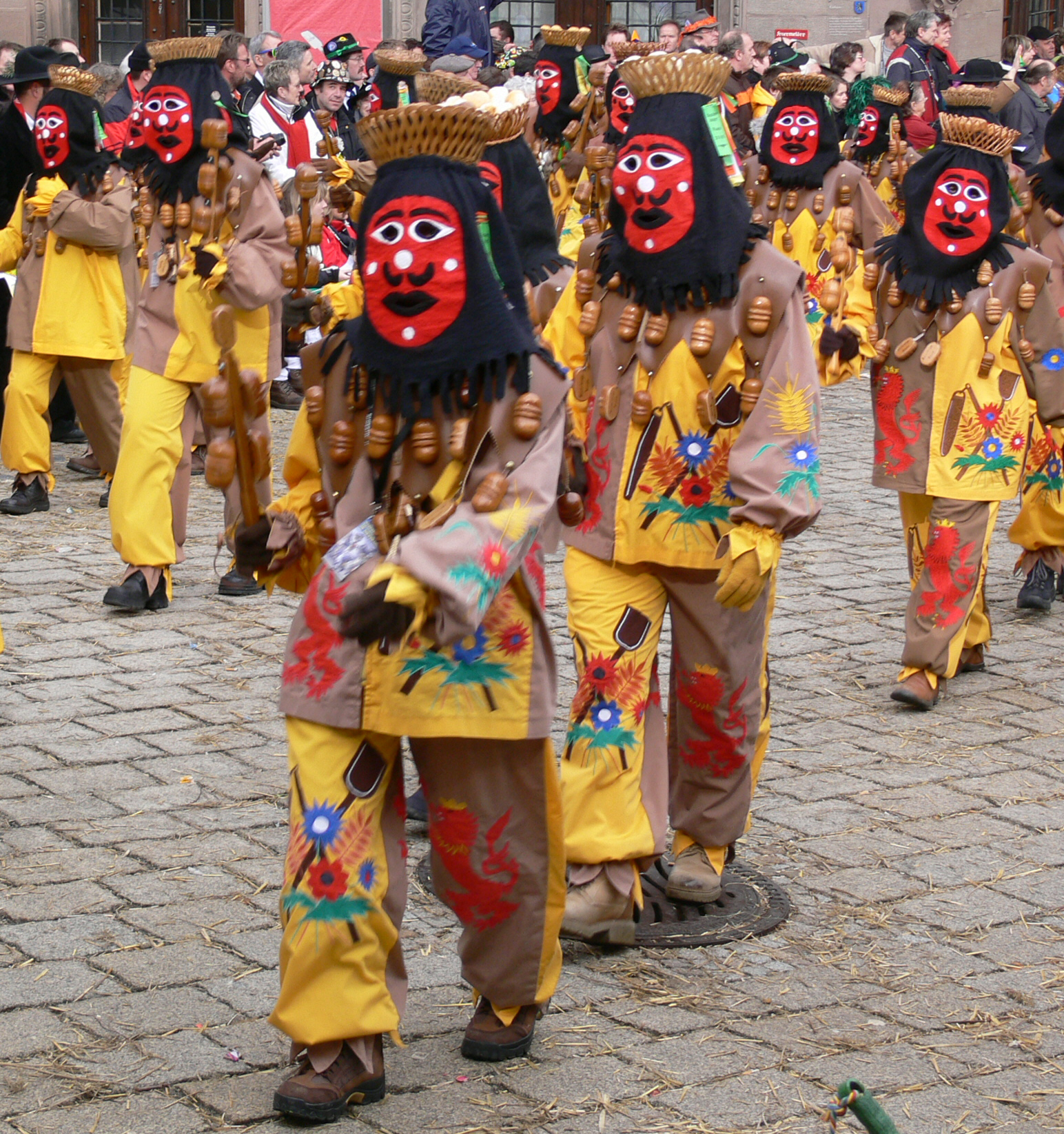 Trommgesellenzunft Munderkingen, Figur: Wusele Veranstaltung: Narrensprung beim Narrentreffen Meßkirch 2006